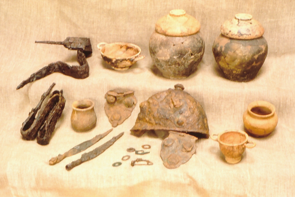 reperti